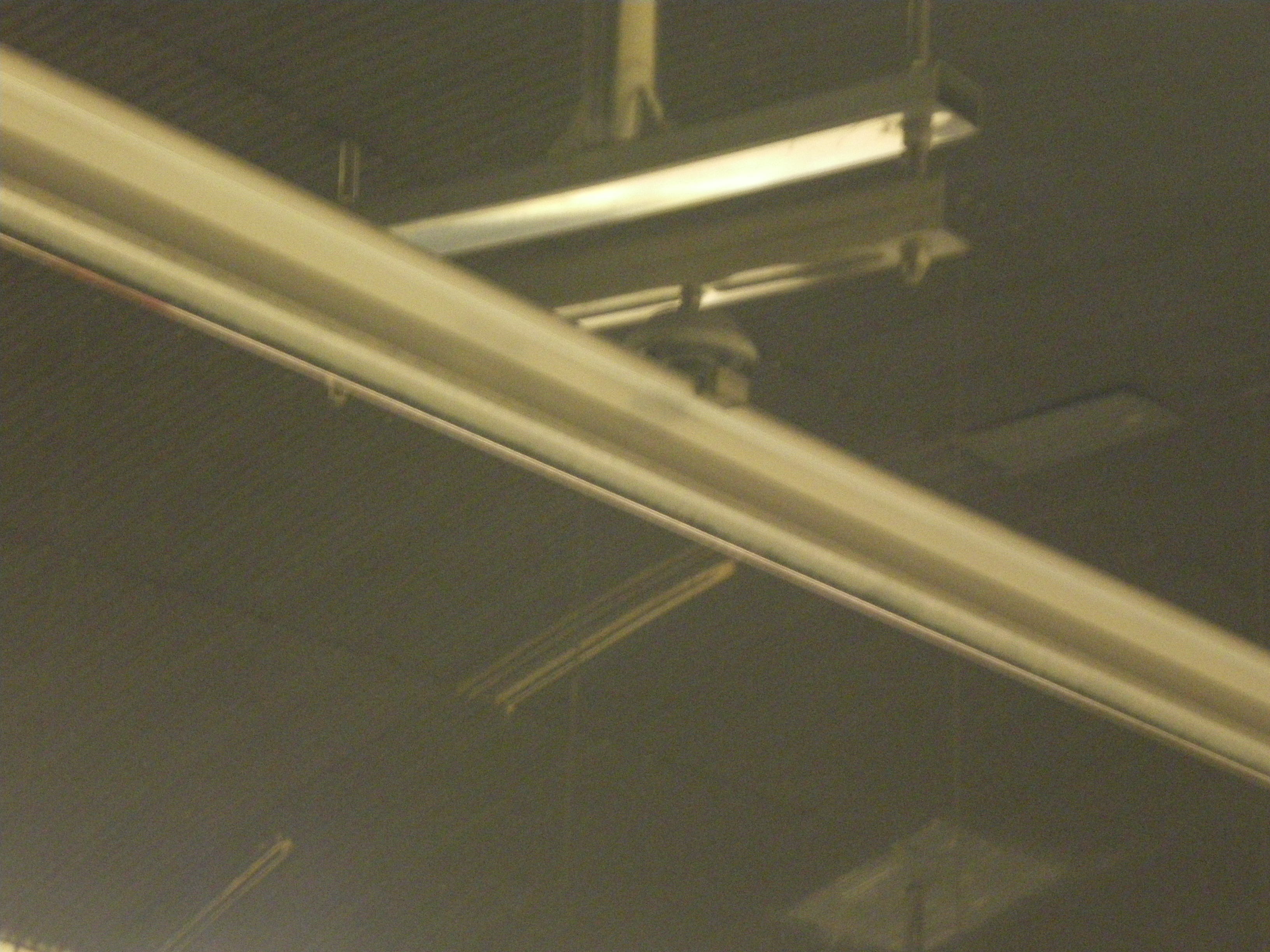 detail de pose de profil aerien de contact sur le metro de Madrid